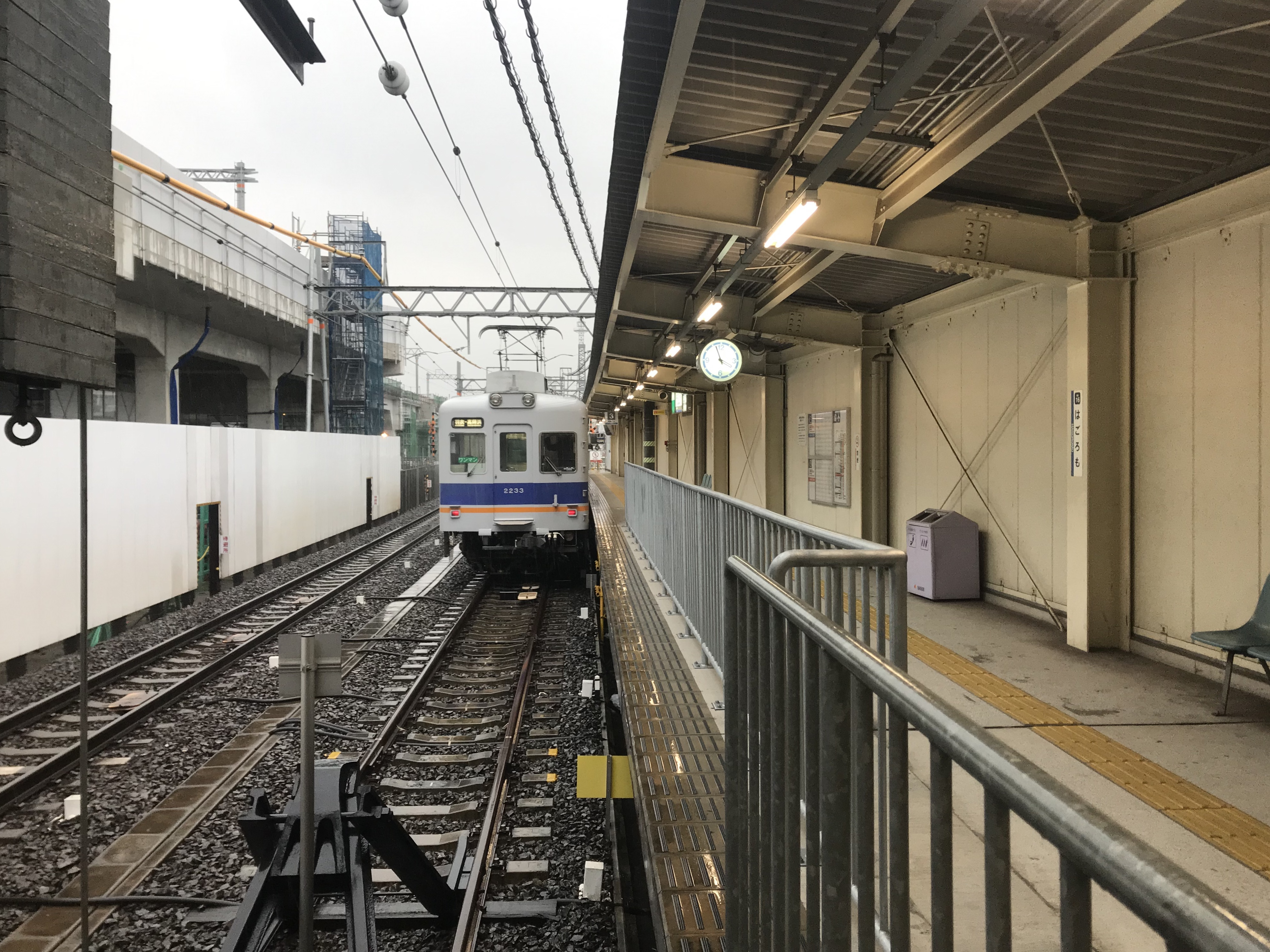 羽衣駅の高師浜線ホームと高師浜線列車